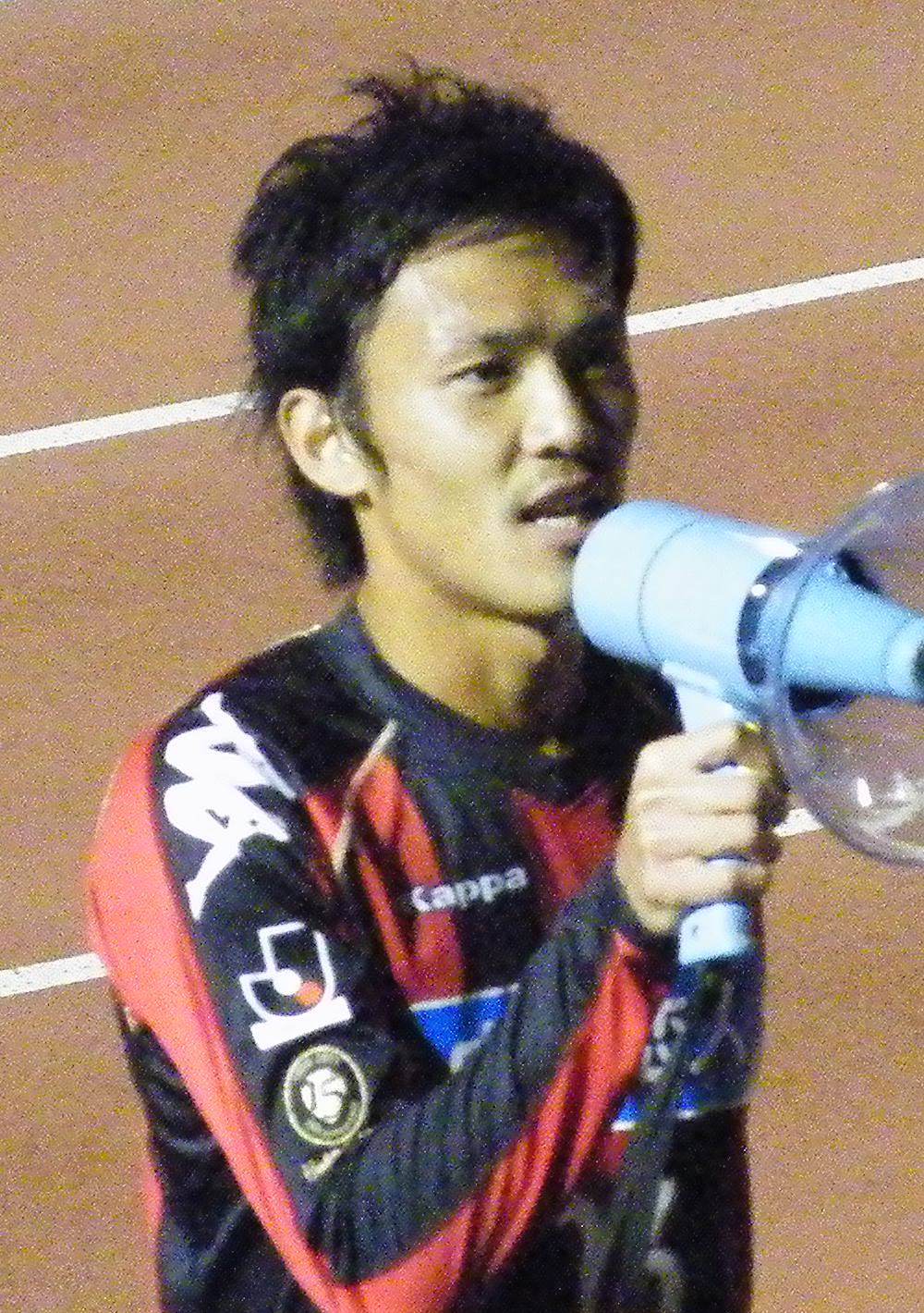 2011年 Jリーグ ディビジョン2 第30節 横浜FC 対 コンサドーレ札幌 の試合後の 上原慎也 選手